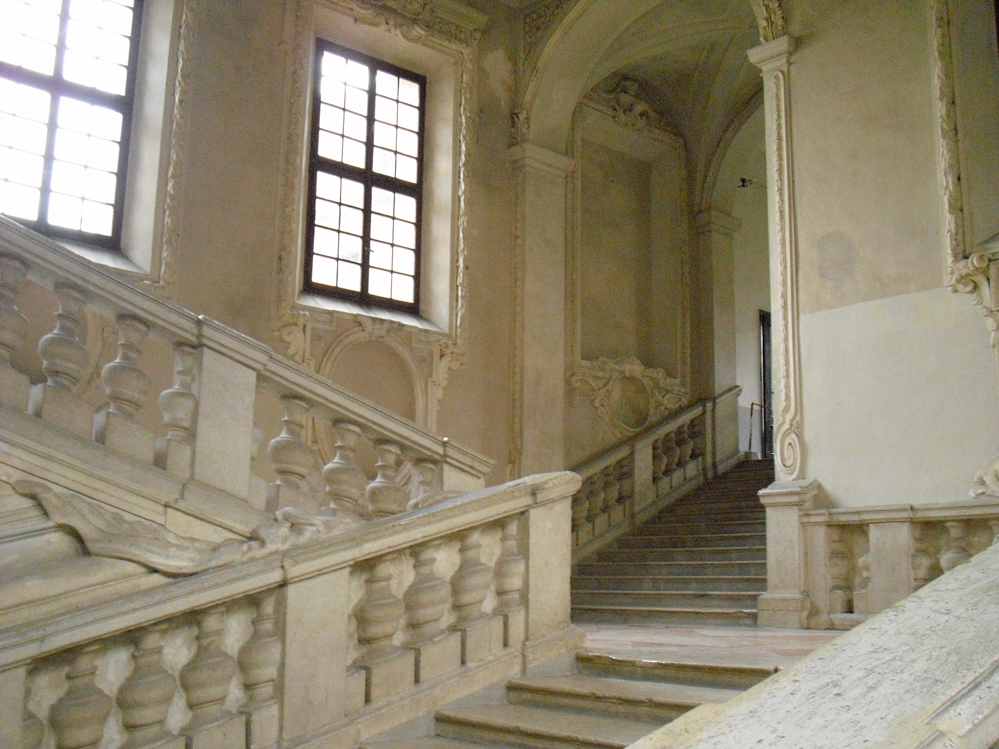 Scalone Barberiniano